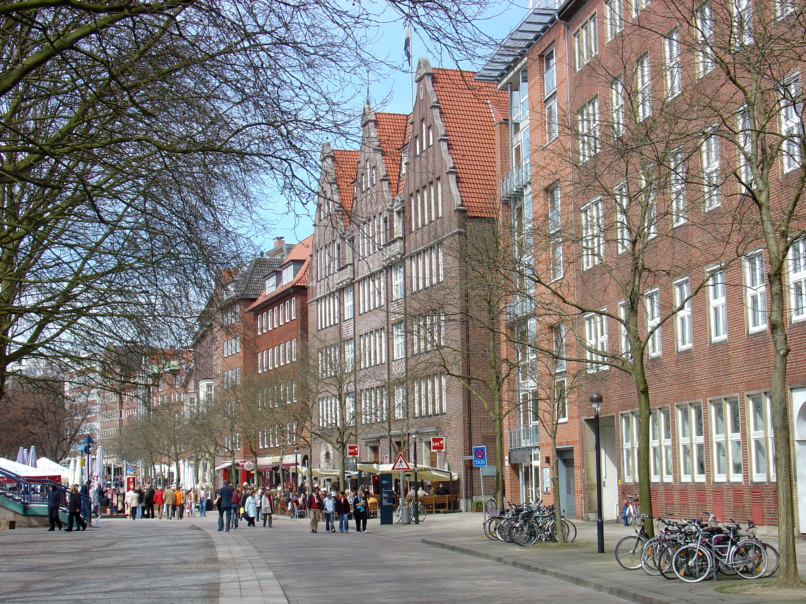 Die Schlachte – Weserpromenade in Bremen; hier im westlichen Bereich.